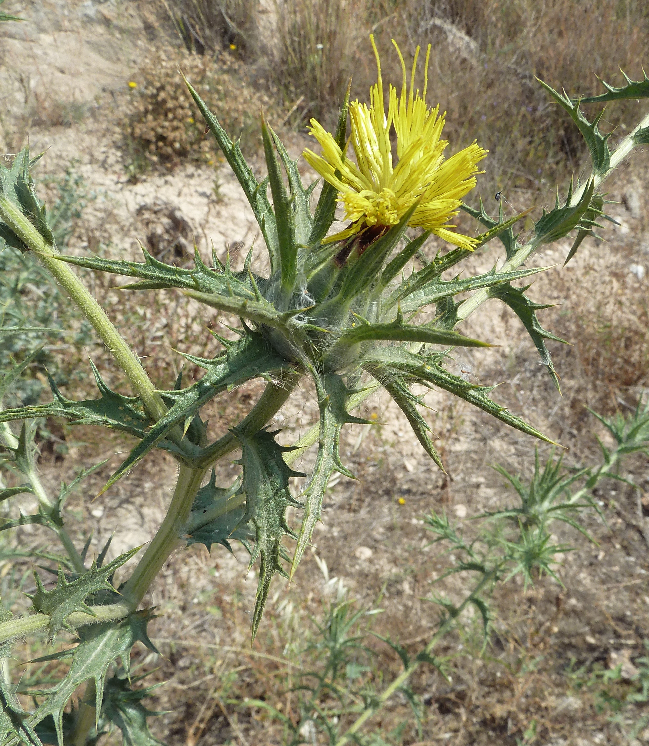 Carthamus lanatus: capítulo e inflorescencia - Cabezo de Pallarés, Albatera (Alicante, España)